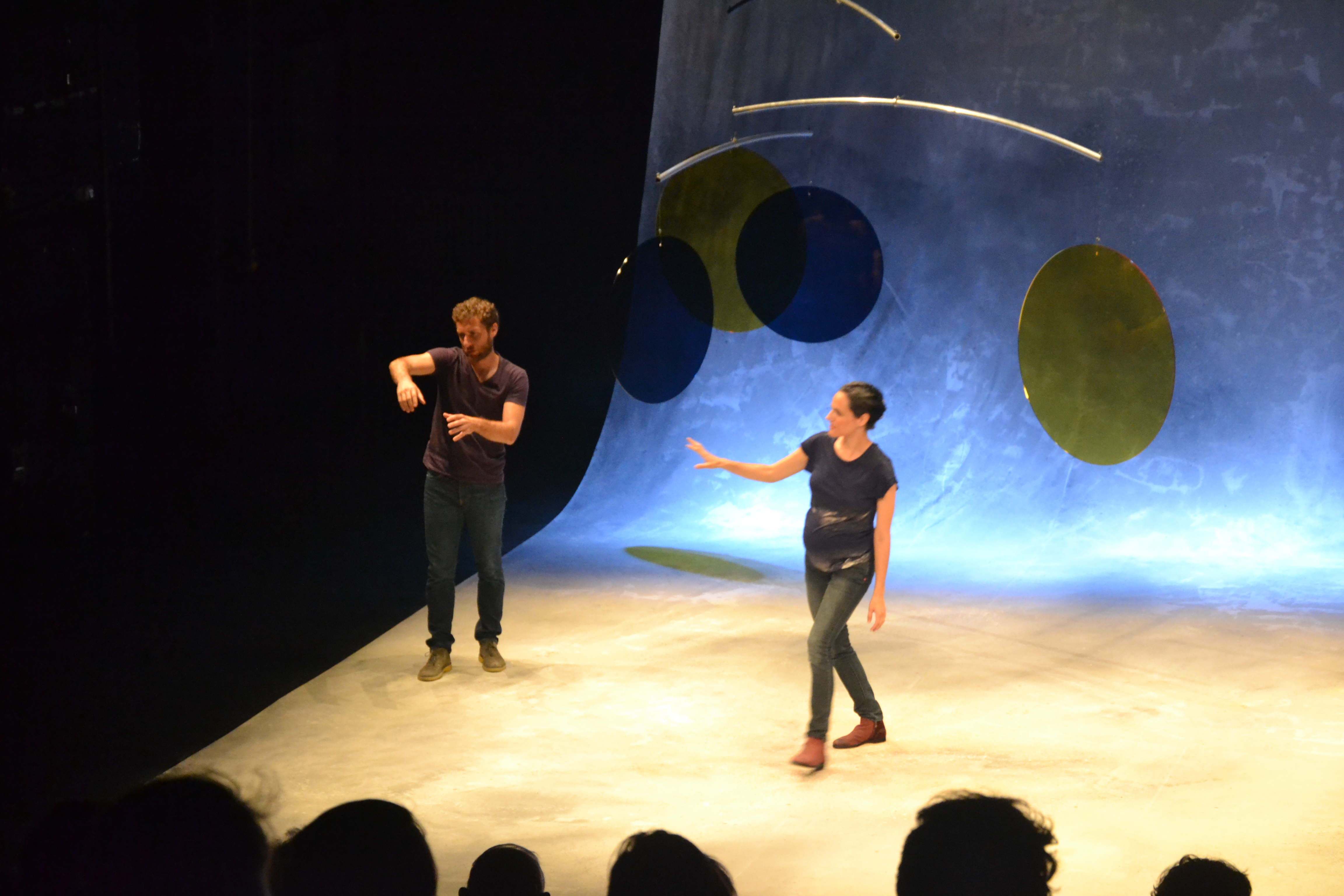 édit à thons durant le Festival d'Avignon 2015